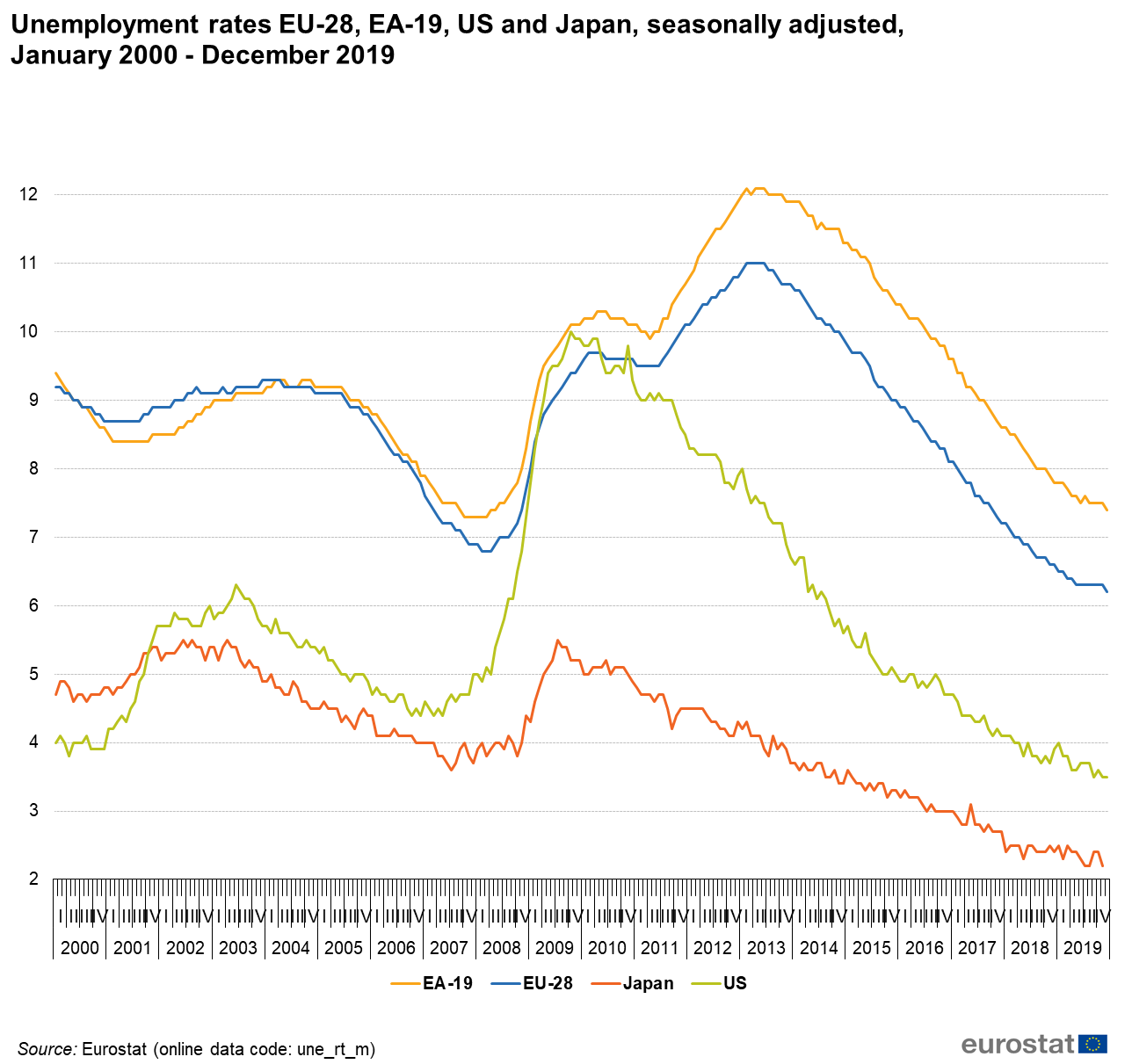 EUとアメリカ合州国と日本の2000年1月～2019年12月までの失業率